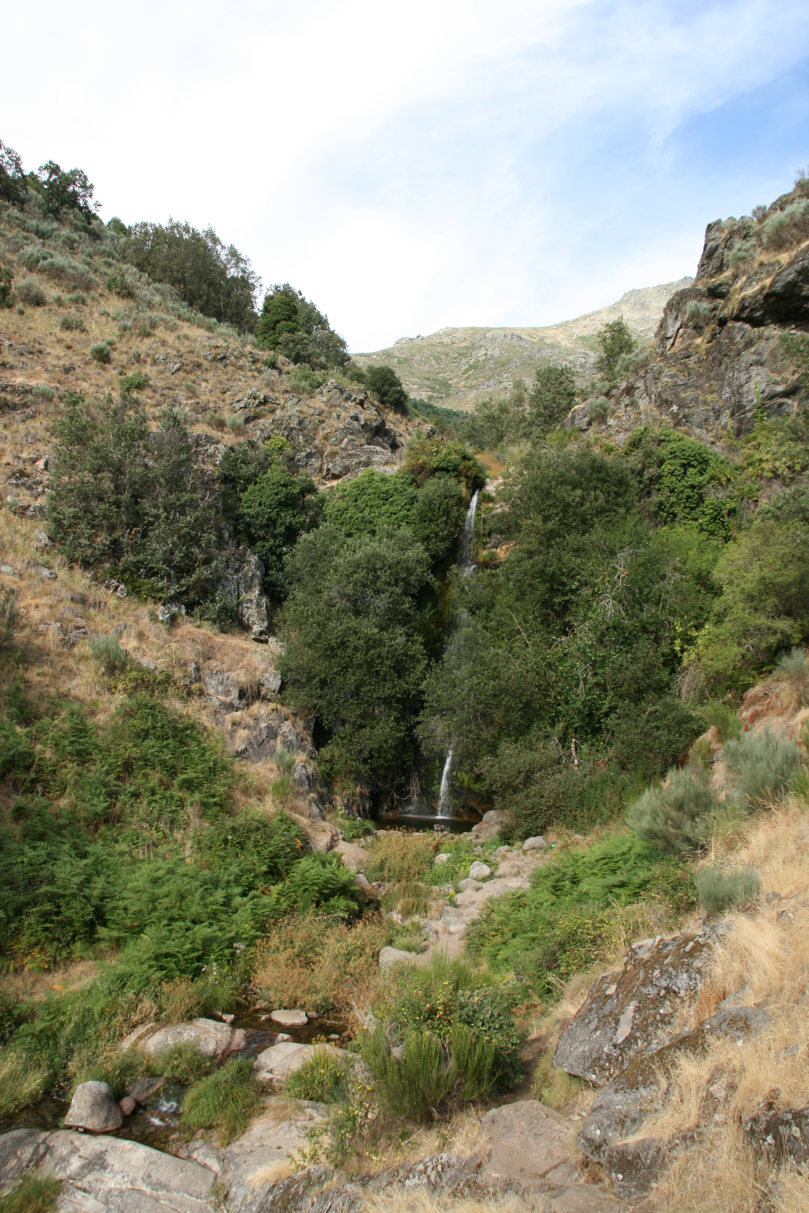 La Chorrera, en el nacimiento del río Ambroz